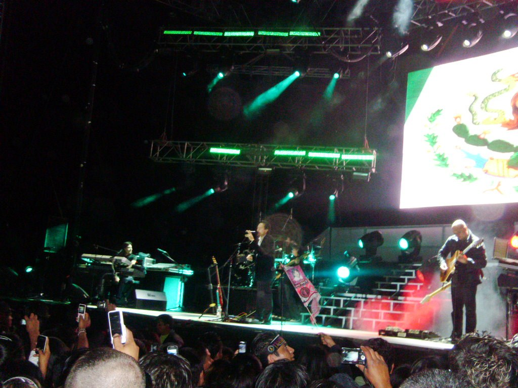 Los Temerarios en uno de sus conciertos en México.